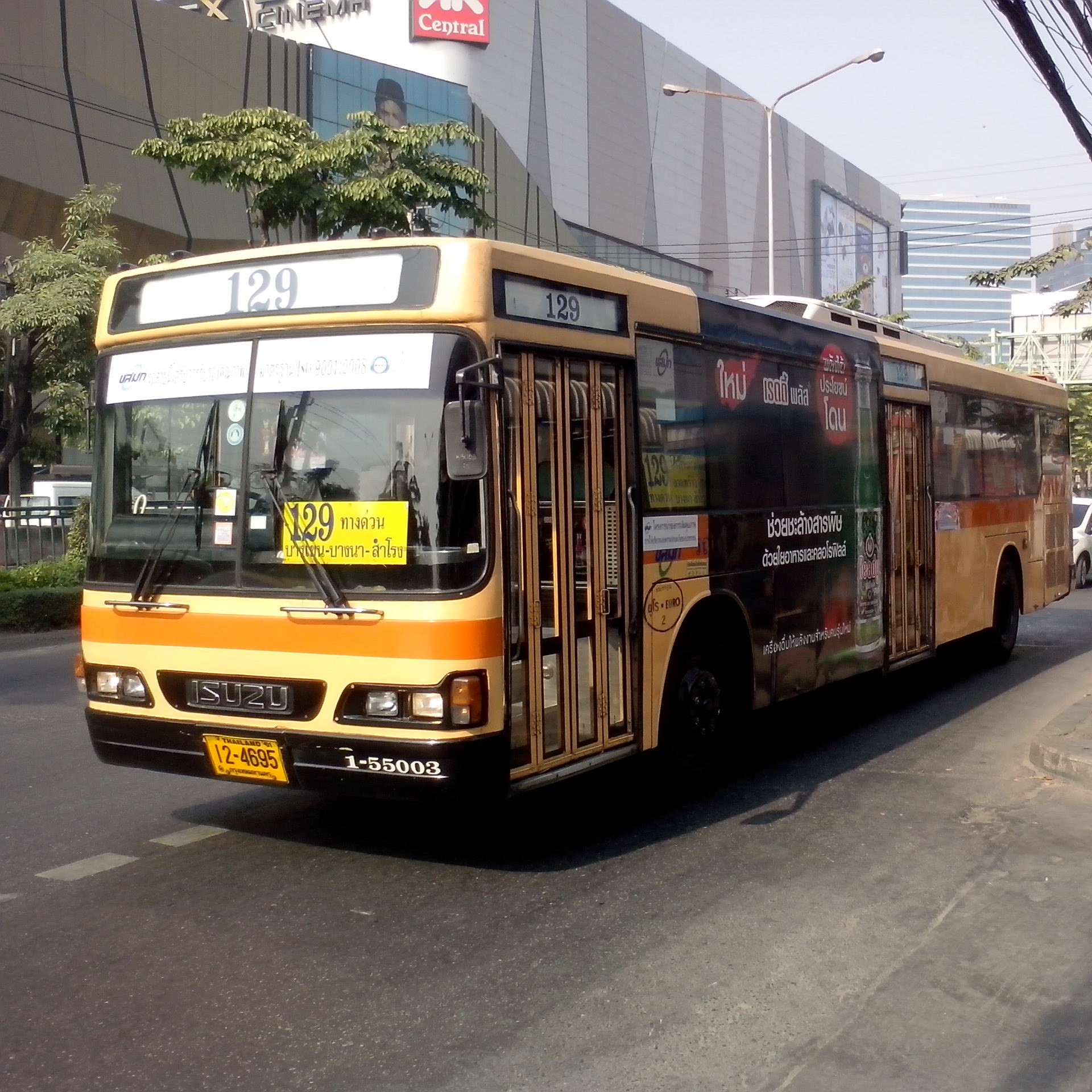 Isuzu bus no.1-55003